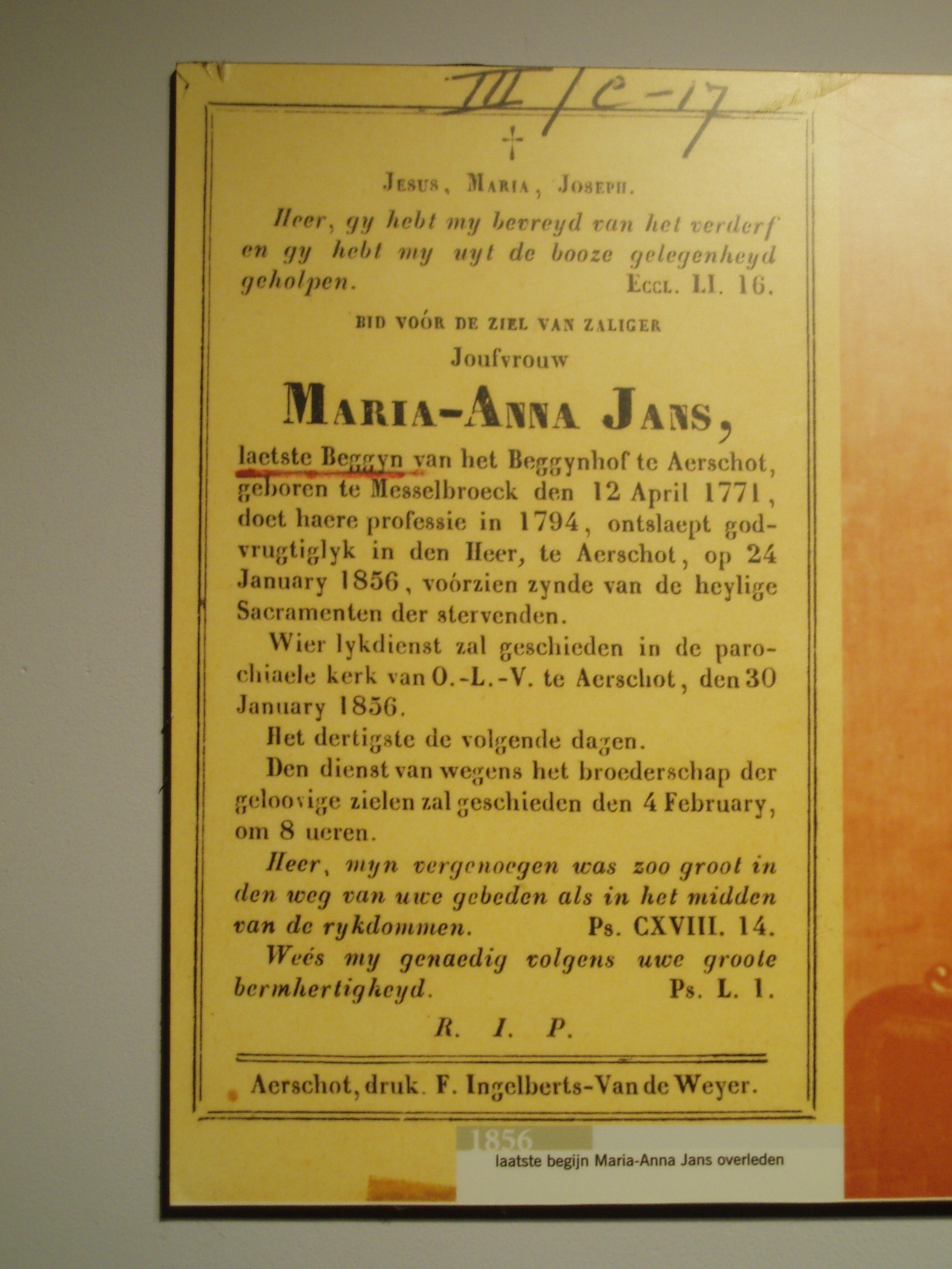 Overlijdensbericht van Maria-Anna Jans, laatste begijn van Aarschot